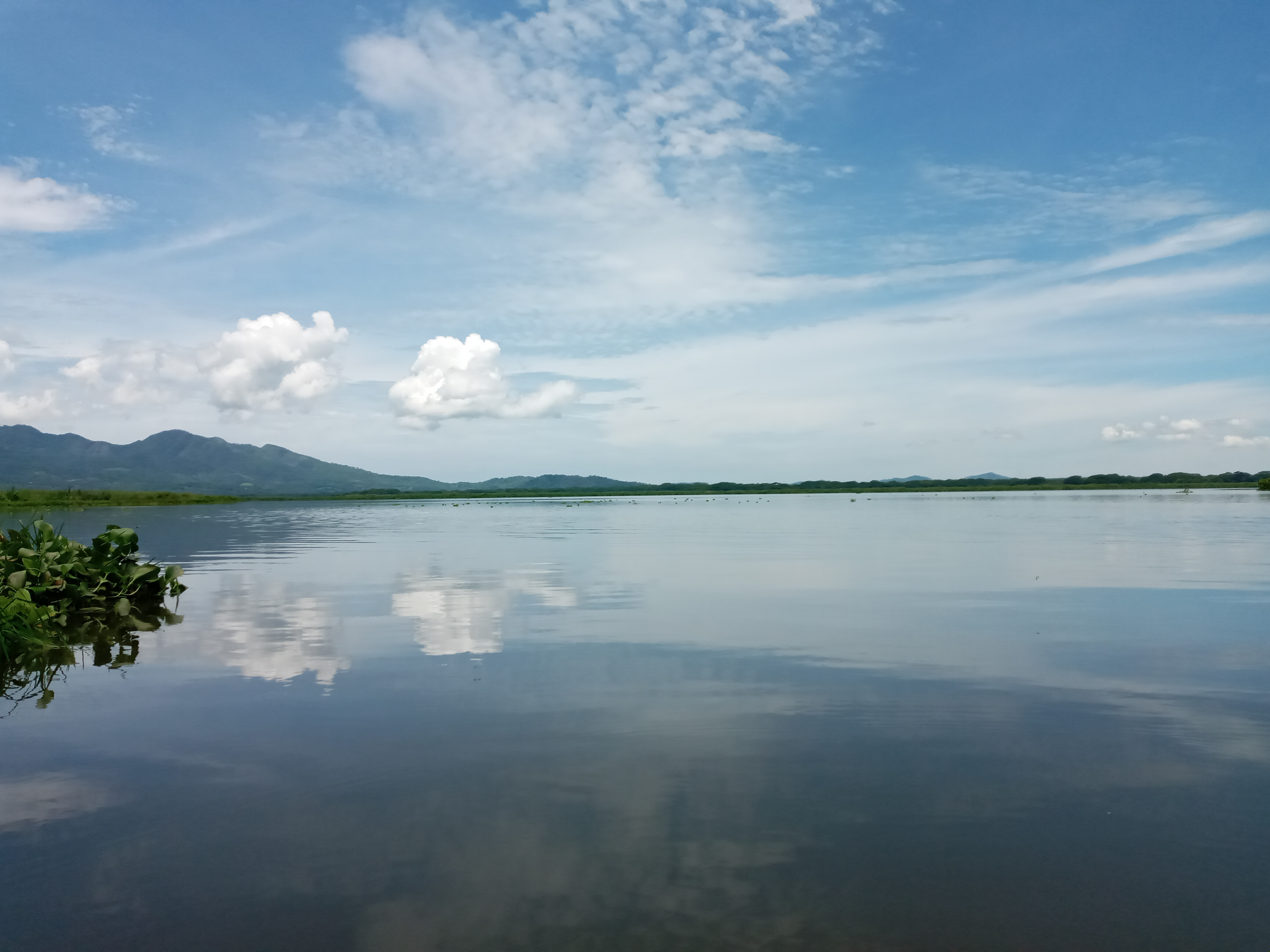 Vista de Laguna del Jocotal